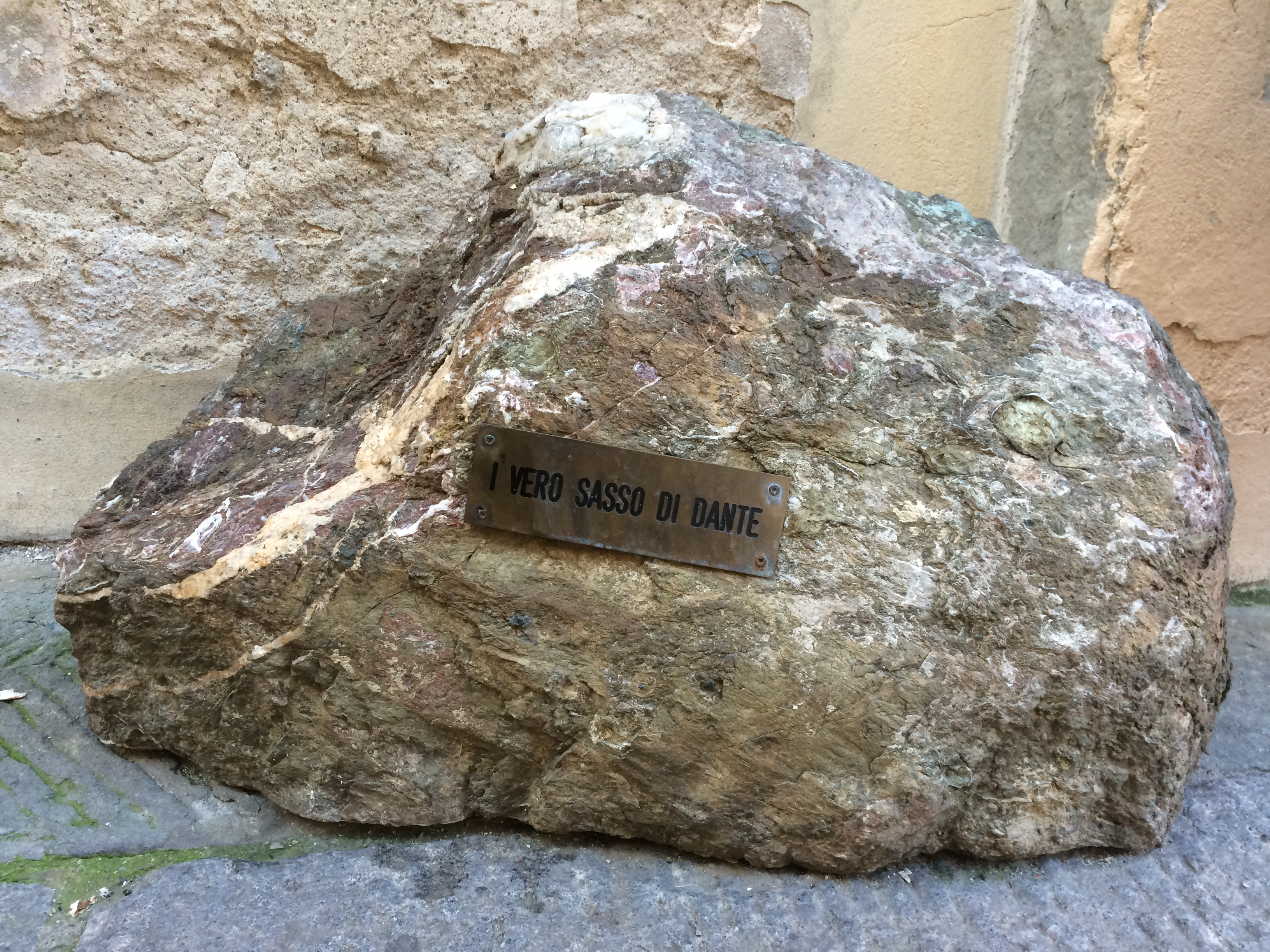 Sasso di Dante in Piazza delle Pallottole a Firenze